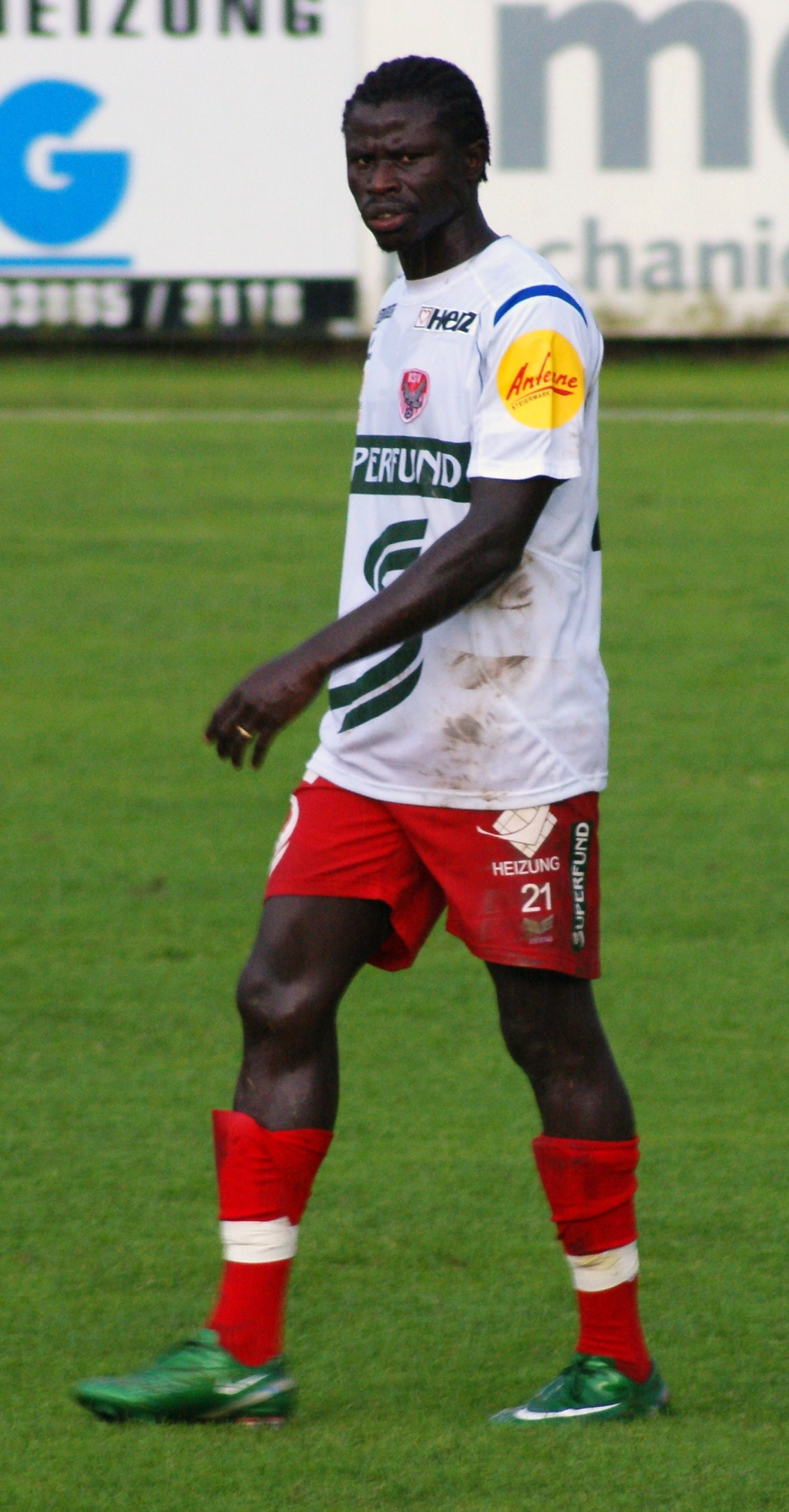 Portrait von Pa Ousman Sonko, Spieler der Kapfenberger SV